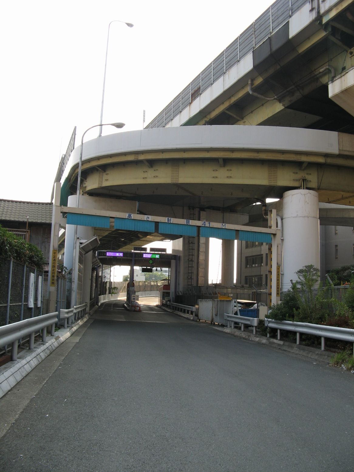 阪神高速阿倍野入口 南望